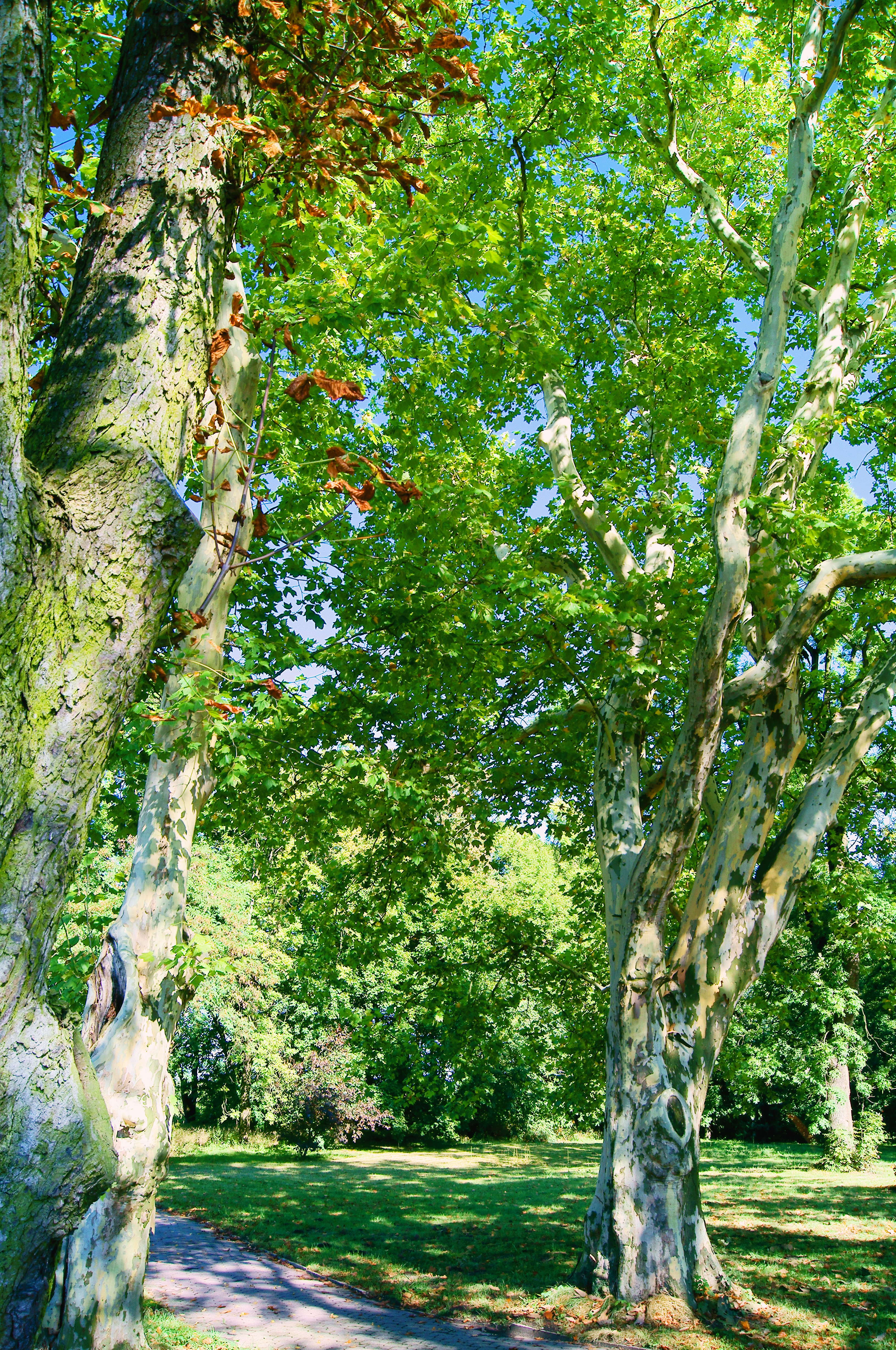 Rzeżewo - park dworski, XIX/XX w.